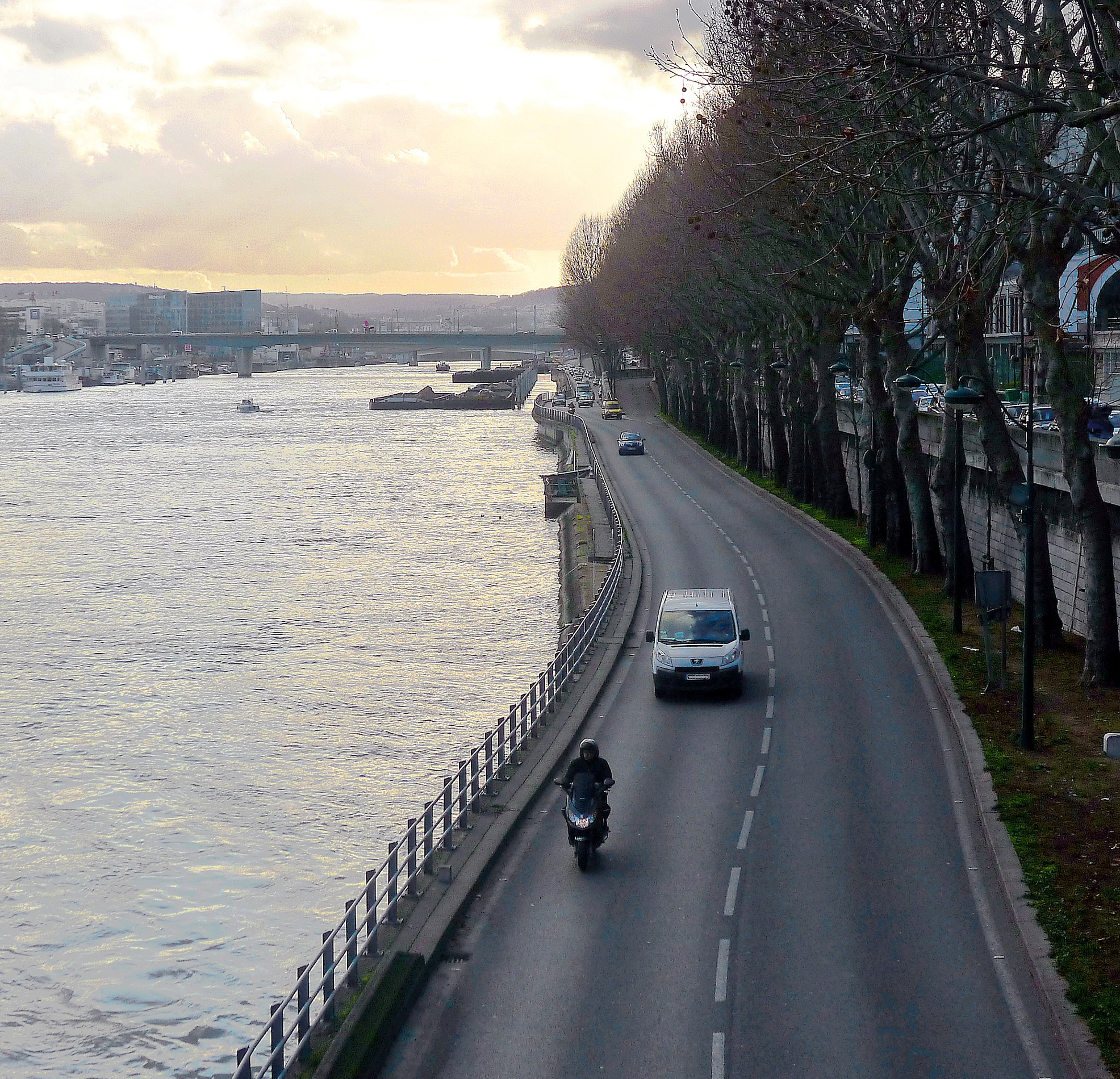 voie Georges Pompidou au niveau du pont Mirabeau - Paris XVI